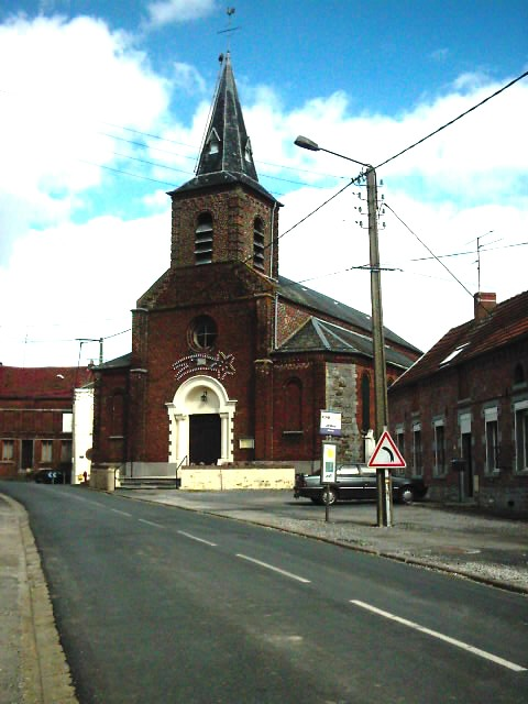 Église Saint-Martin à Élesmes, France.